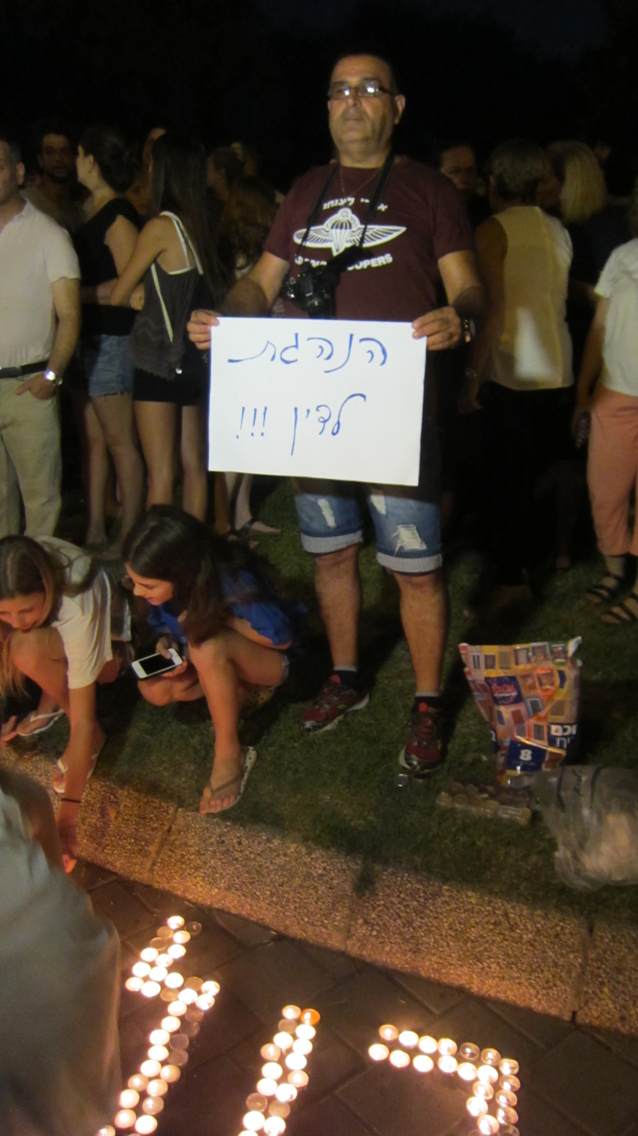 פרשת גל בק - מחאה שקטה בצומת קק"ל חיים לבנון ת"א - מקום התאונה 18.7.15